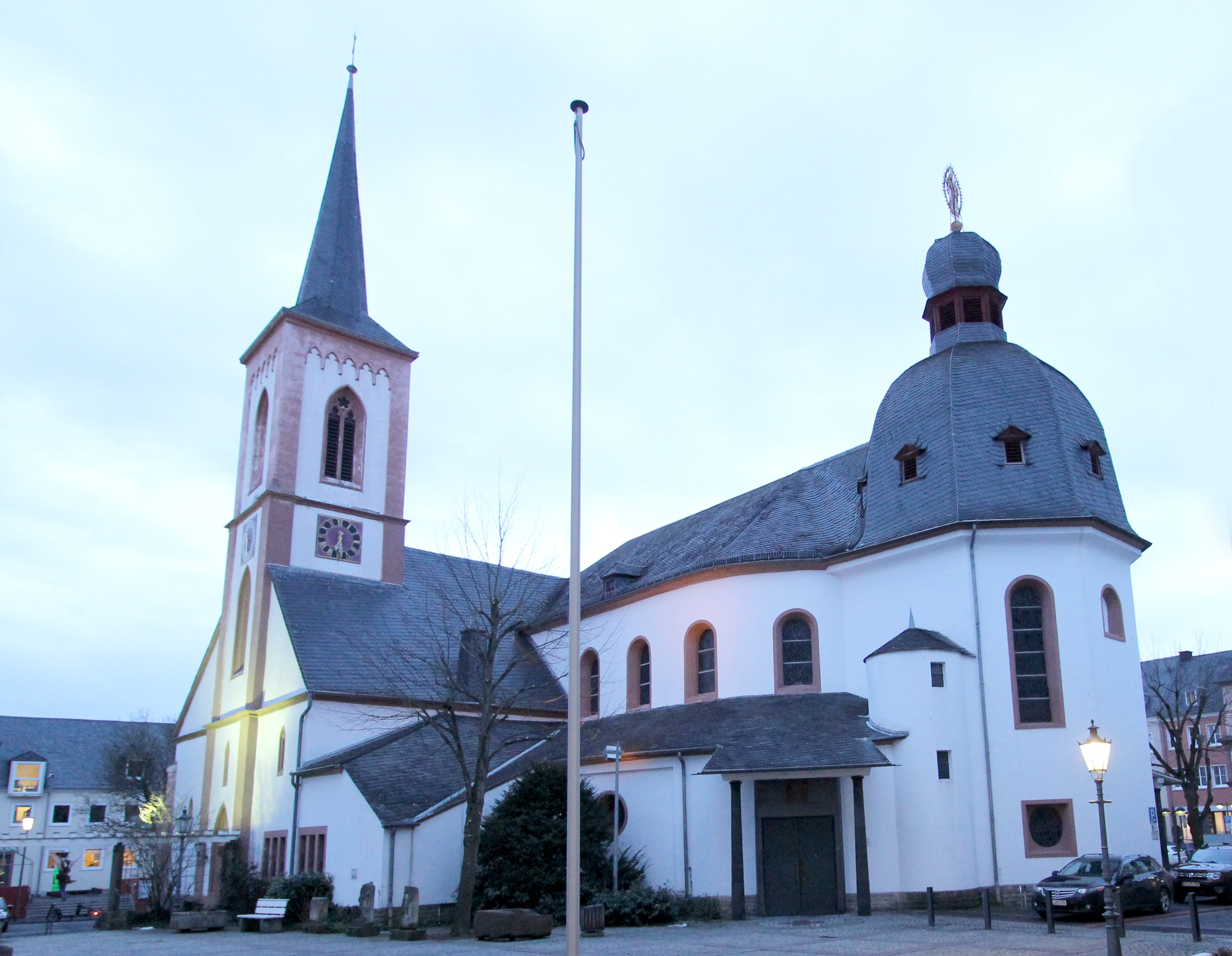 54634 Bitburg, Rathausplatz. Im Kern spätgotischer Saal, Erweiterung zu dreischiffiger Halle mit Westturm 1860, Architekt Alexander Franz Himpler, lotrechte, barockisierende Erweiterung, 1922/23, Architekt Eduard Endler, Köln; im Winkel zwischen Alt- und Erweiterungsbau Barockportal, 1751; mit Ausstattung. Orgelbau der Firma Späth 1962; später (1986) von Gustav Cartellieri aus Wittlich überarbeitet. Aufnahme von 2018.